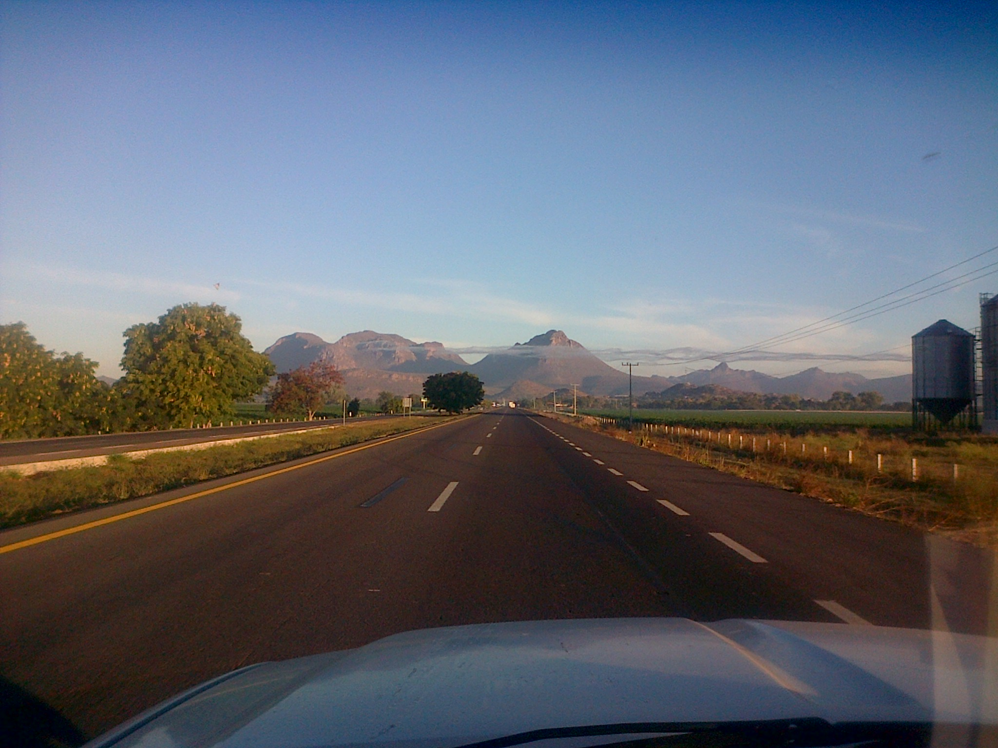 Llegando a San Miguel